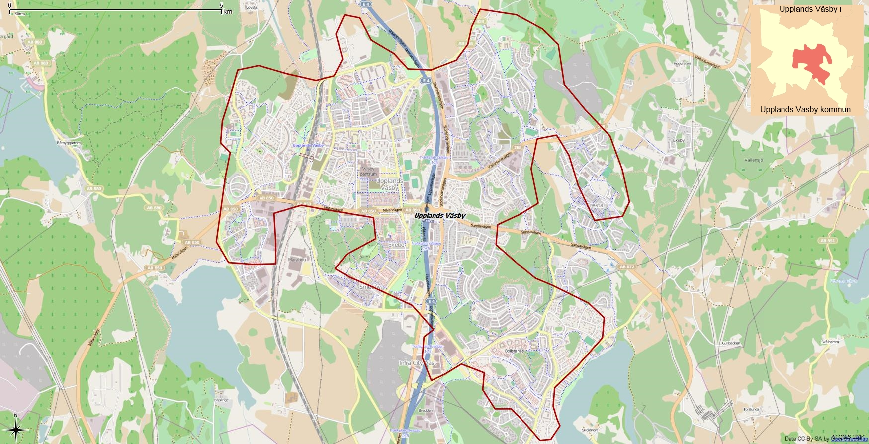 Tätorten Upplands Väsbys gränser enligt Atlas över rikets indelningar 1992.